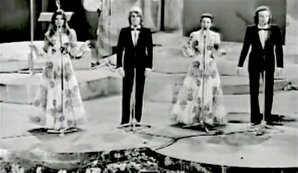 Il complesso italiano Ricchi e Poveri al Festival di Sanremo 1971